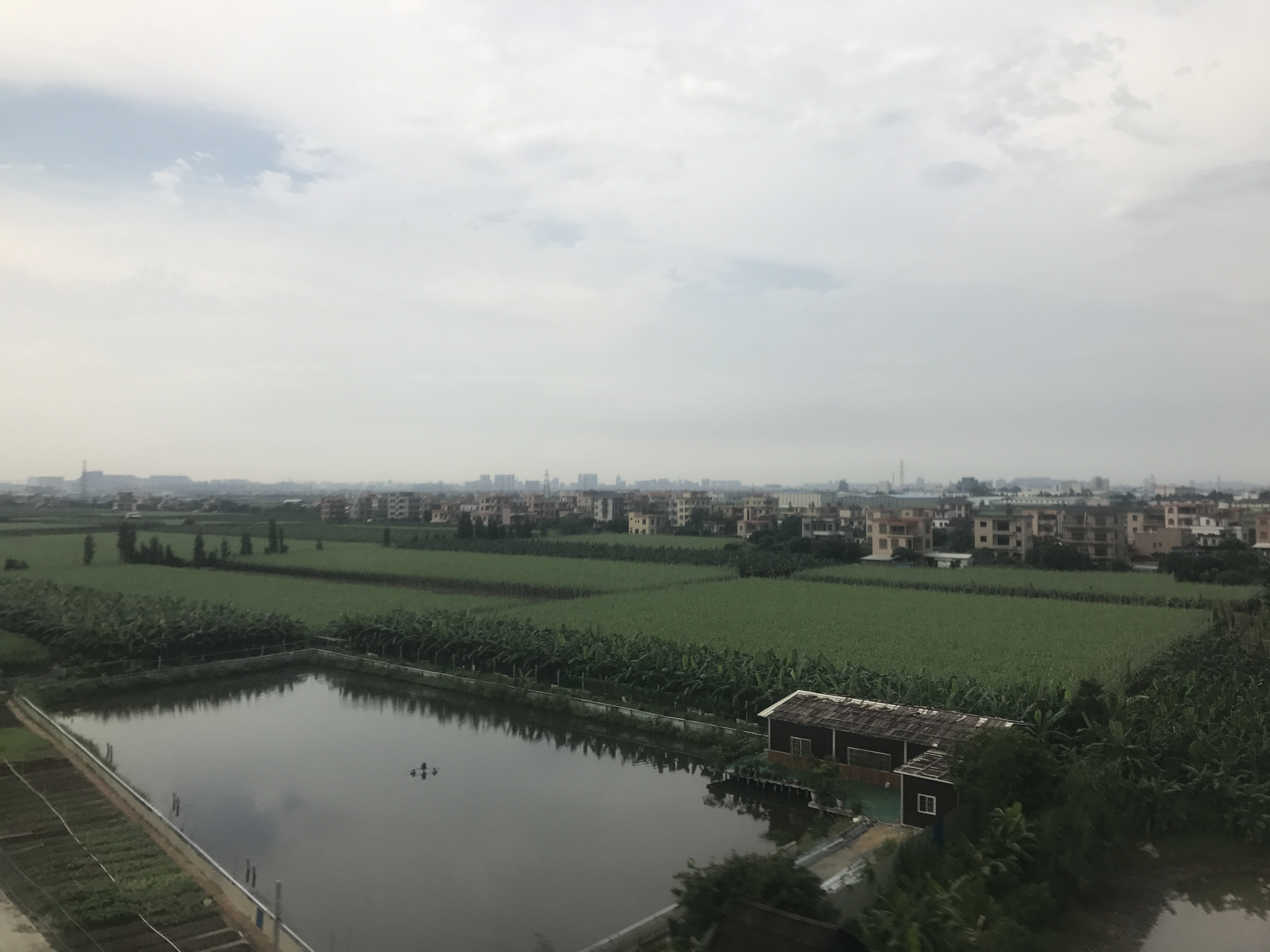 深圳北行きの高速鉄道列車より望む広東省広州市南沙区